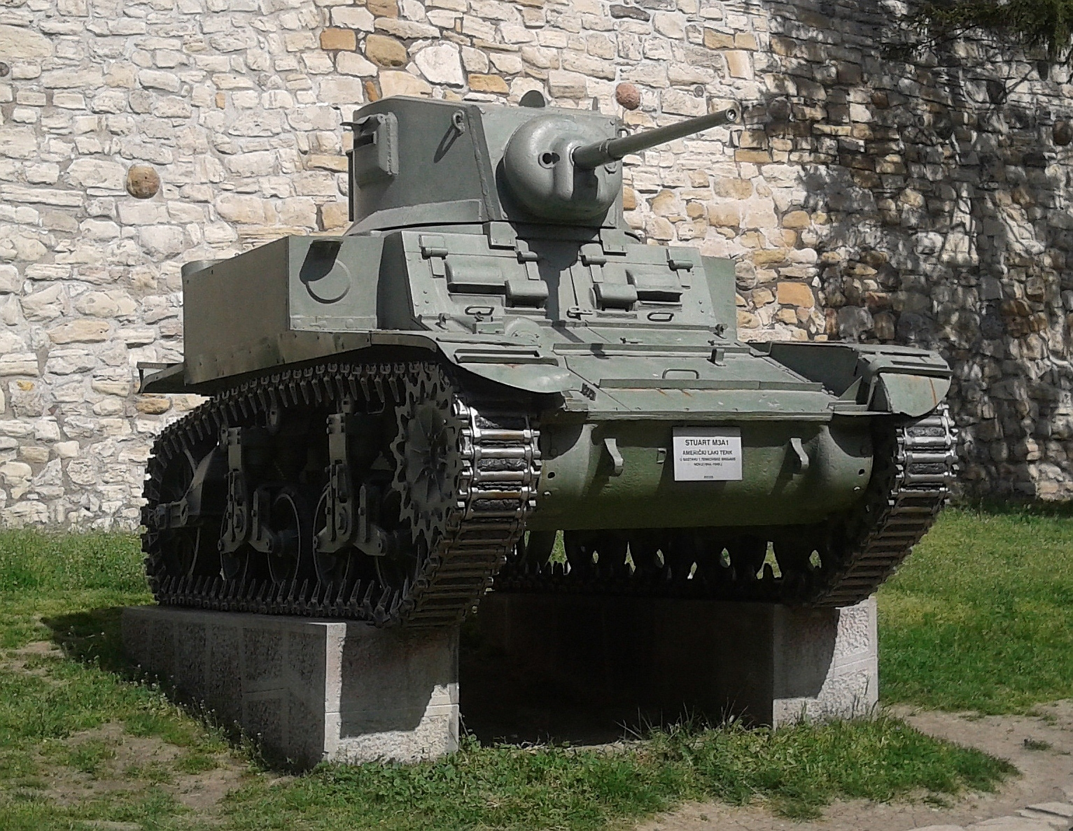 Panzer (M3-A1 Stuart) in der frei zugänglichen äußeren Ausstellung des Militärmuseums Belgrad (Serbien)